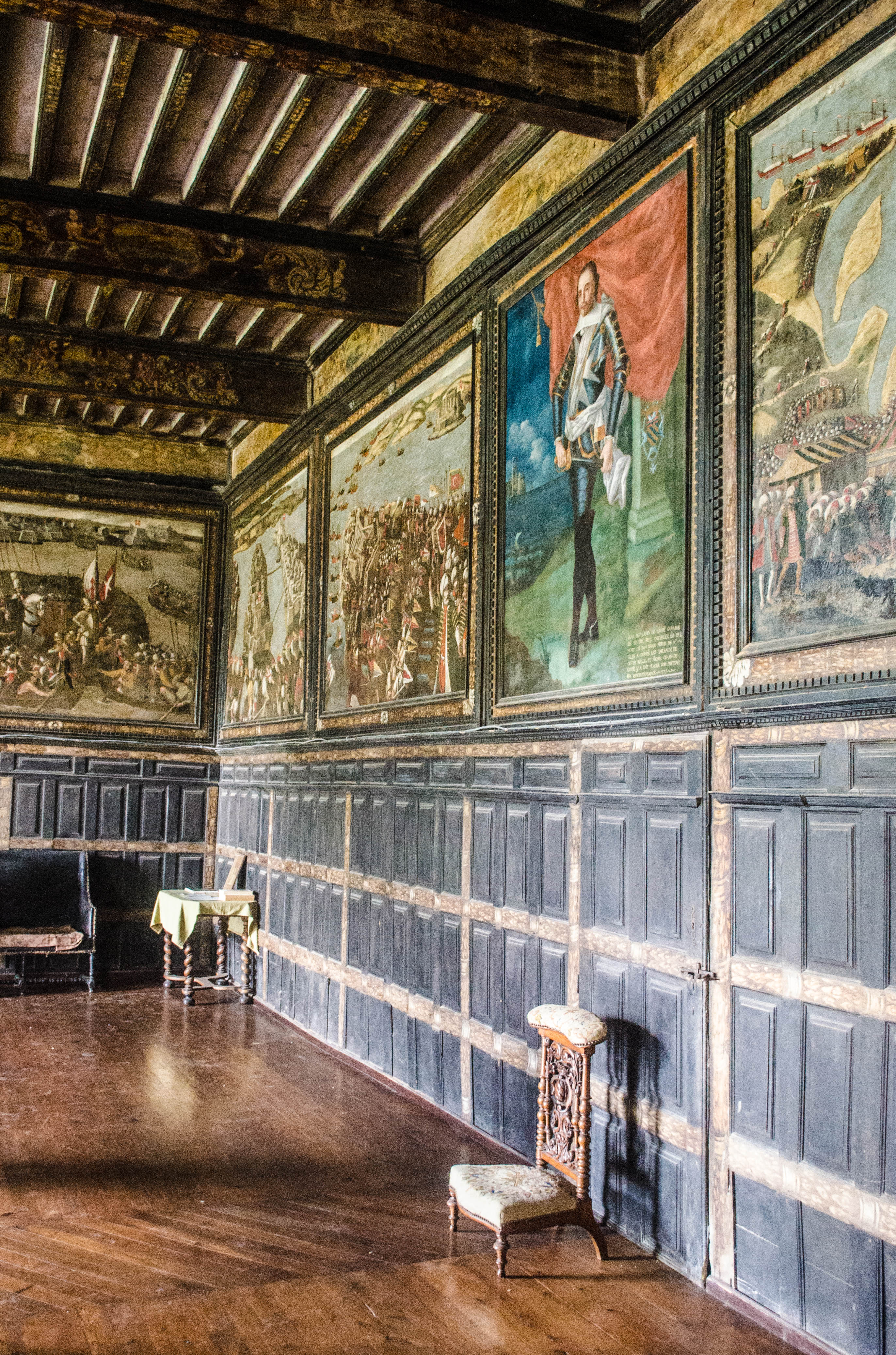 Château de Lacassagne, Saint-Avit-Frandat, Gers, France. Salle des Chevaliers de Malte.